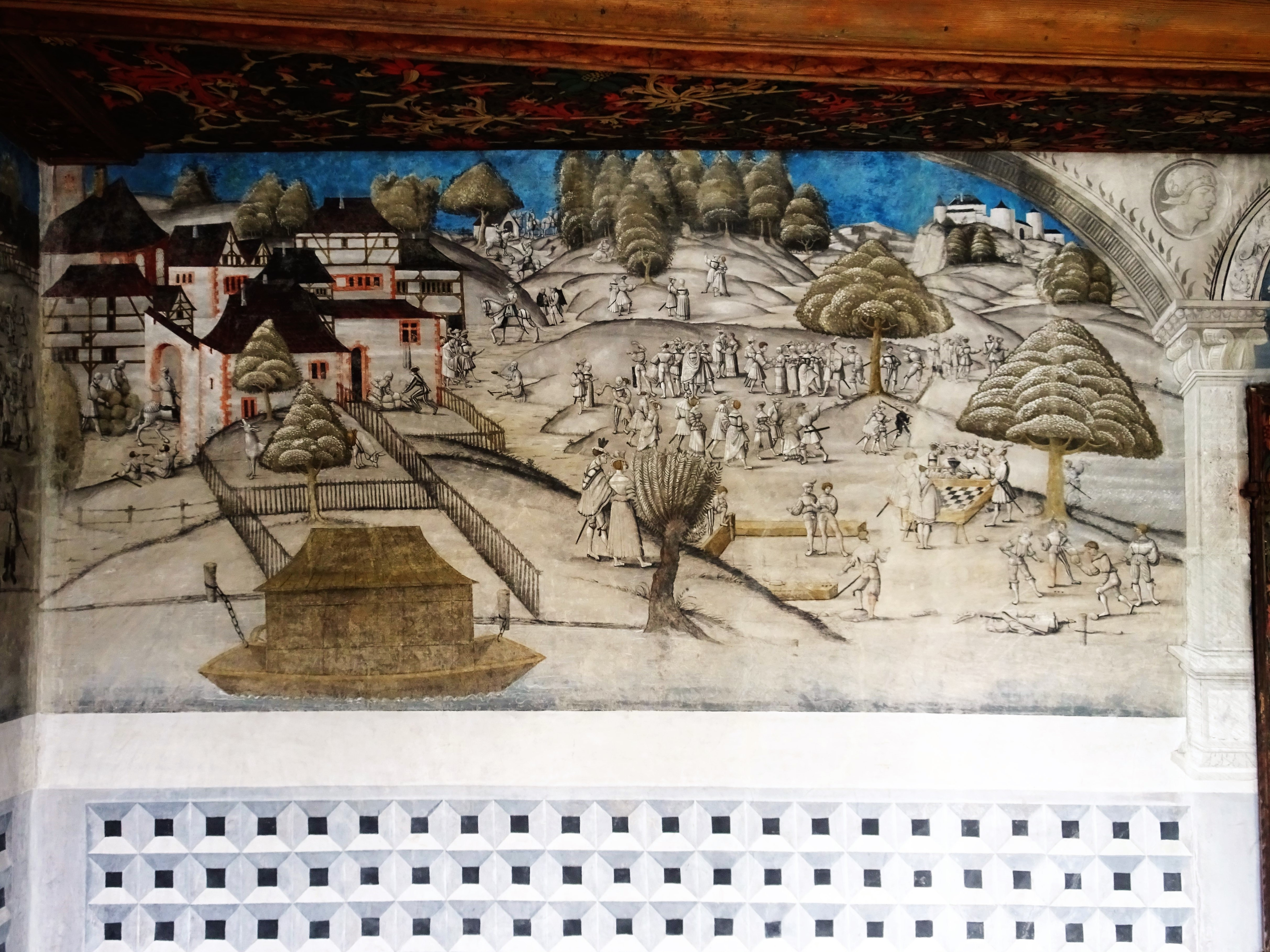 Wandbild/ Fresco im Kloster Sankt Georgen in Stein am Rhein. Dieses Bild zeigt das Fresco der Nordwand im sogenannten "Festsaal" der Prälatur des ehemaligen Klosters. Dieses Bild zeigt einen Teil jener Wandgemälde, die in der Fachliteratur "Zurzacher Messe" benannt wurden. Die Messe in Zurzach war ein bedeutender Markt im süddeutschen Raum im Mittelalter. Das Fresco entstand um 1515. Beteiligte Maler: Tomas Schmid und Ambrosius Holbein.